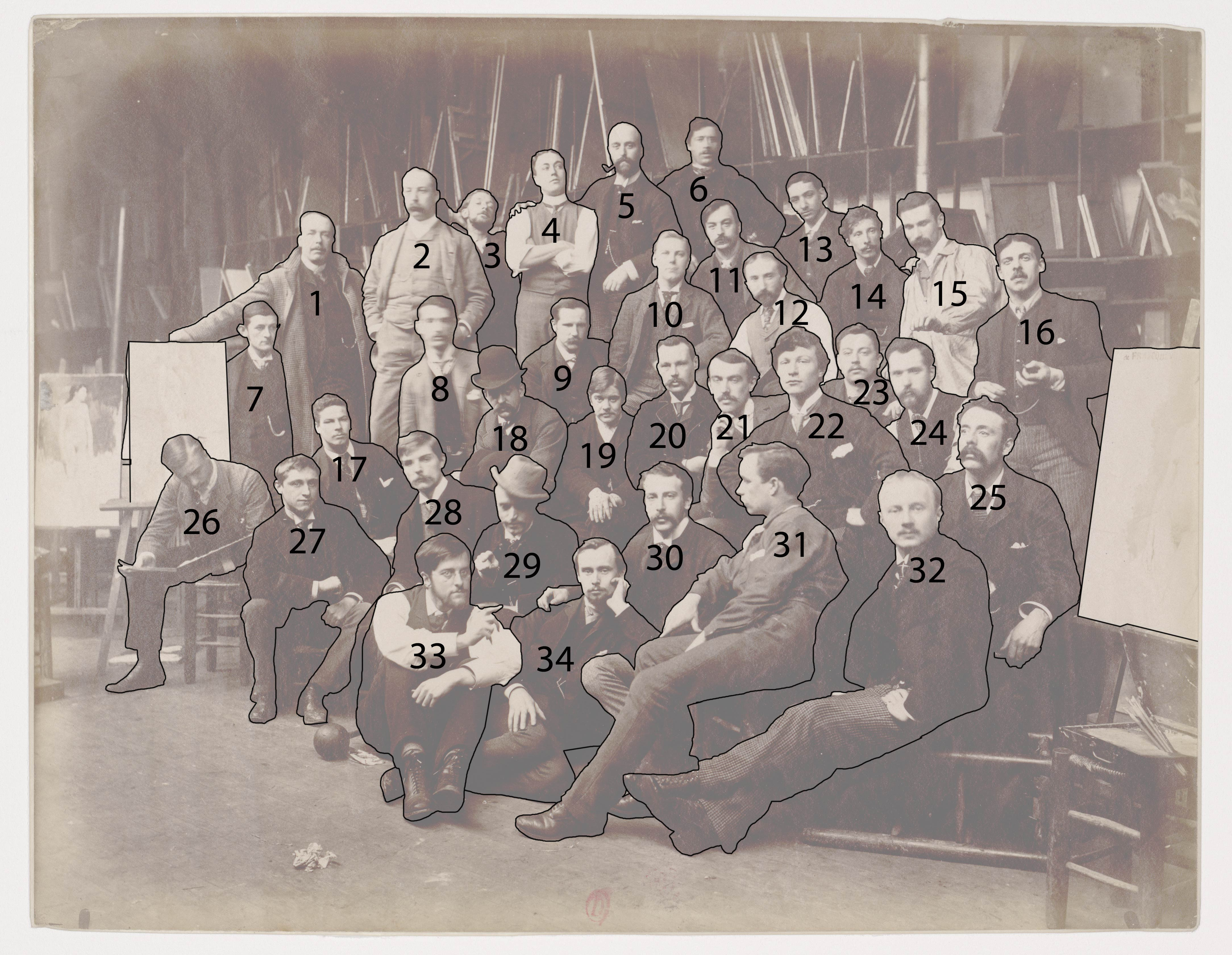 N° Identification 1 Harry Bates 2 Archibald Standing Hartrick 3 Eduard Vuillard 4 D. Howard Hitchcock 5 Paul Serusier 6 Paul Gauguin 7 Non individuato 8 Akseli Gallen-Kallela 9 Non individuato 10 Charles Bartlett11 Arnold Hendrik Koning 12 Vincent Van Gogh 13 Georges Lacombe 14 Pierre Bonnard 15 Paul Ranson 16 John Longstaff 17 Eeero Jarnefelt 18 Loius de Sparre 19 Non individuato 20 Edouard Cremey 21 John Peter Russell 22 Arthur Briet 23 Andries Bonger 24 Ker Xavier Roussel 25 Walter Whiters 26 Emil Wikström 27 Non individuato 28 Albert Edelfelt 29 Dodge Mc Knight 30 Emanuel Phillips Fox 31 Ferdinand Hart Nibbrig 32 Hal Waugh 33 Julien Rabache 34 Tudor Saint Georges Tucker